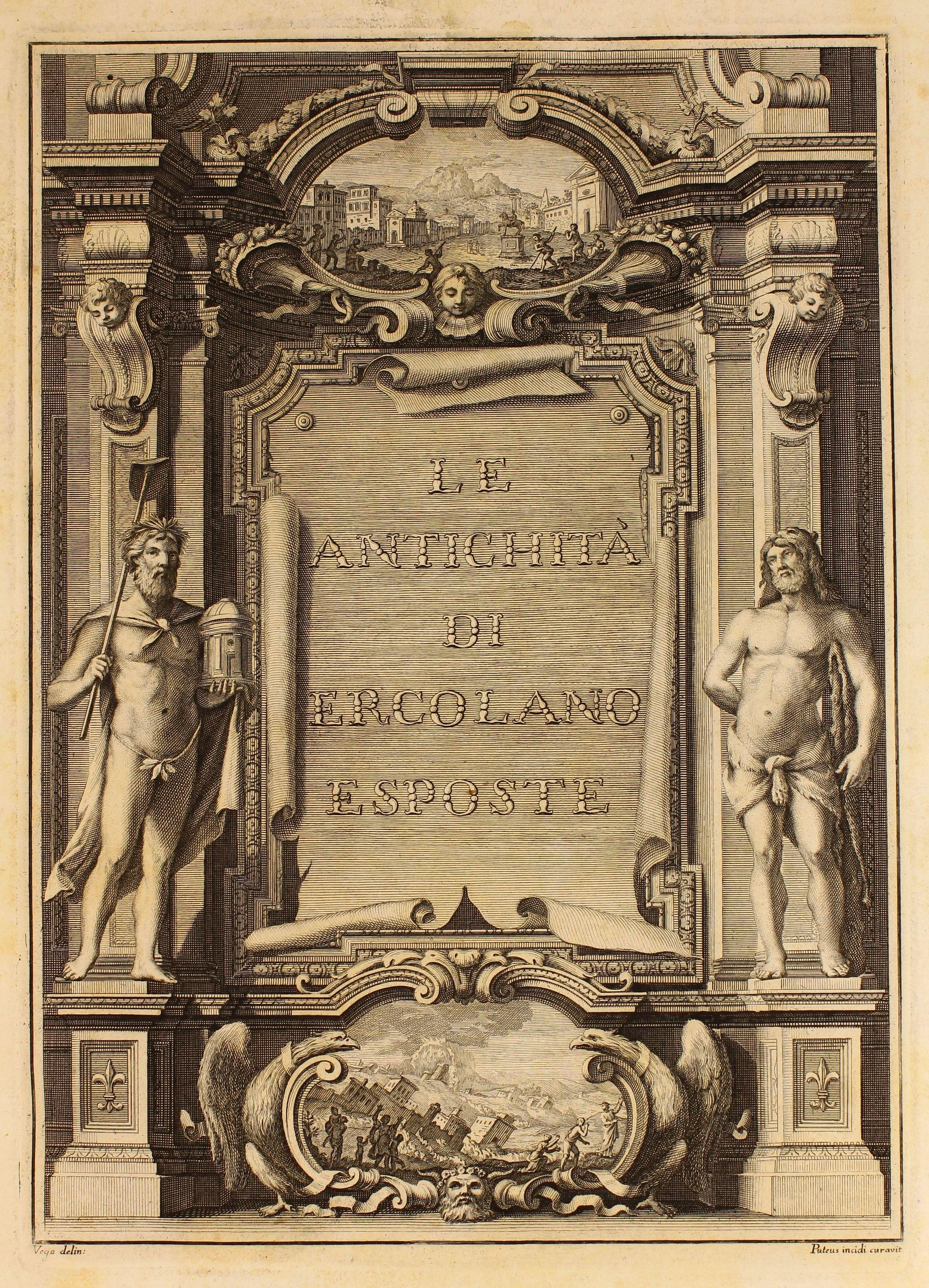 Descripción bibliográfica: Delle antichità di Ercolano. Tomo primo. - Le pitture antiche d'Ercolano e contorni incise con qualche spiegazione.Tomo primo . - Napoli:|bnella Regia Stamperia, 1757 . - [8], 279, [8] p., [2] h. de grab., [1] h. pleg. : il. ; Fol. (48x36 cm) Materia: Herculano (Ciudad antigua) - Antigüedades romanas Materia: Pintura mural- Italia-Herculano- Obras anteriores a 1800 Materia: Pintura romana- Italia- Herculano- Obras anteriores a 1800 Materia: Herculano (Italia)- Restos arqueológicos- Obras anteriores a 1800 Ilustrador: ILUSTRADORES Baiardi, Ottavio Antonio, 1690-1765) Nolli, Carlo il Aloja, Giuseppe,|d17..-1788? il. Vanni, Nicola il Cepparoli, Francesco il Vanvitelli, Luigi il Morghen, Filippo,|d1730-ca.1807, il. La Vega, Francesco il Azzerboni, Giuseppe il Gaultier, Pierre il Paderni, Camillo il Orazi, Nicola il Impresor: Accademia ercolanese di archeologia. - Stamperia Reale (Nápoles) Lugar de impresión: Italia. Napolés Localización: Vea la ilustración en su contexto Libro completo en pdf